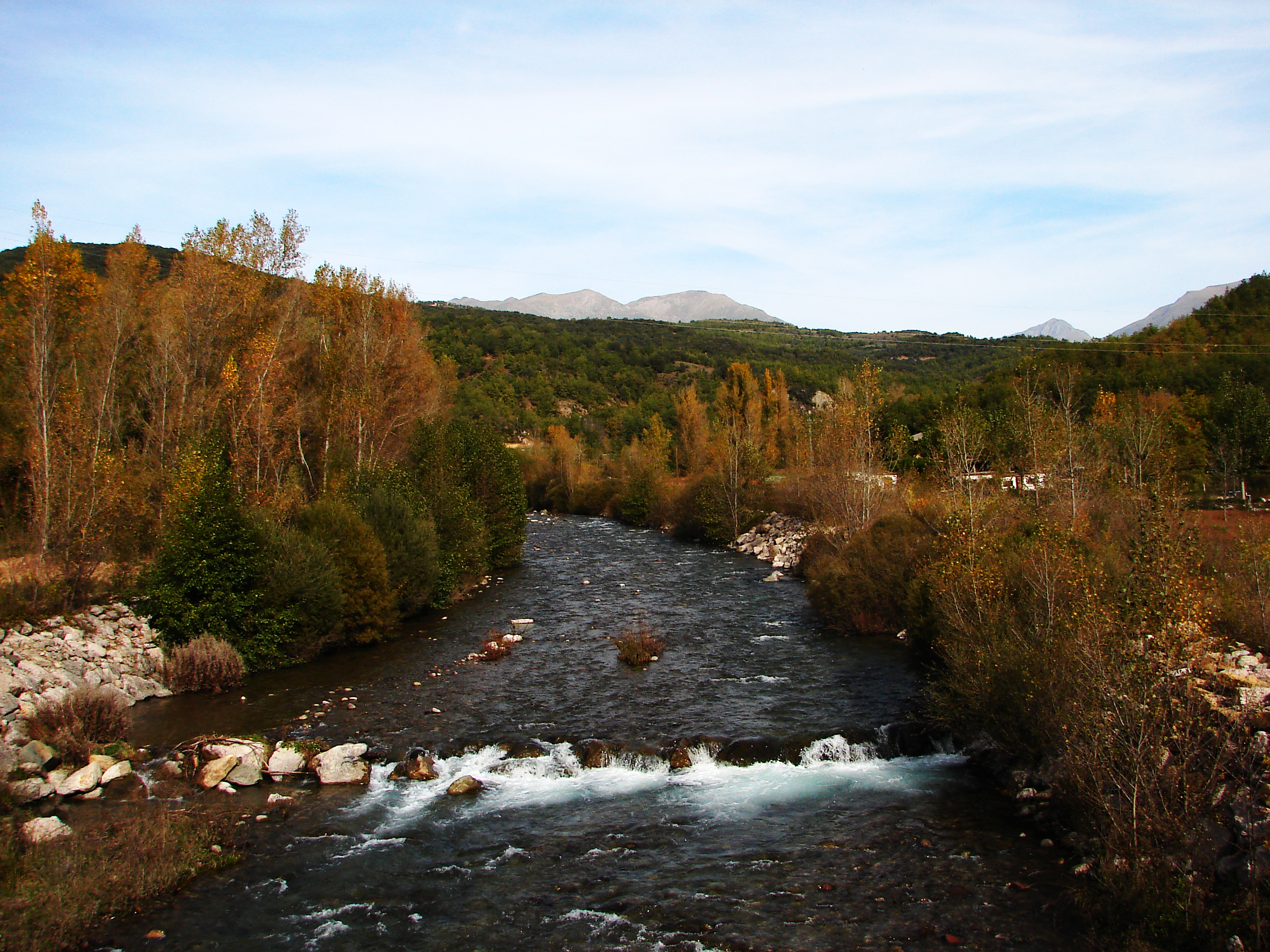 Riu Flamicell al seu pas per Senterada.